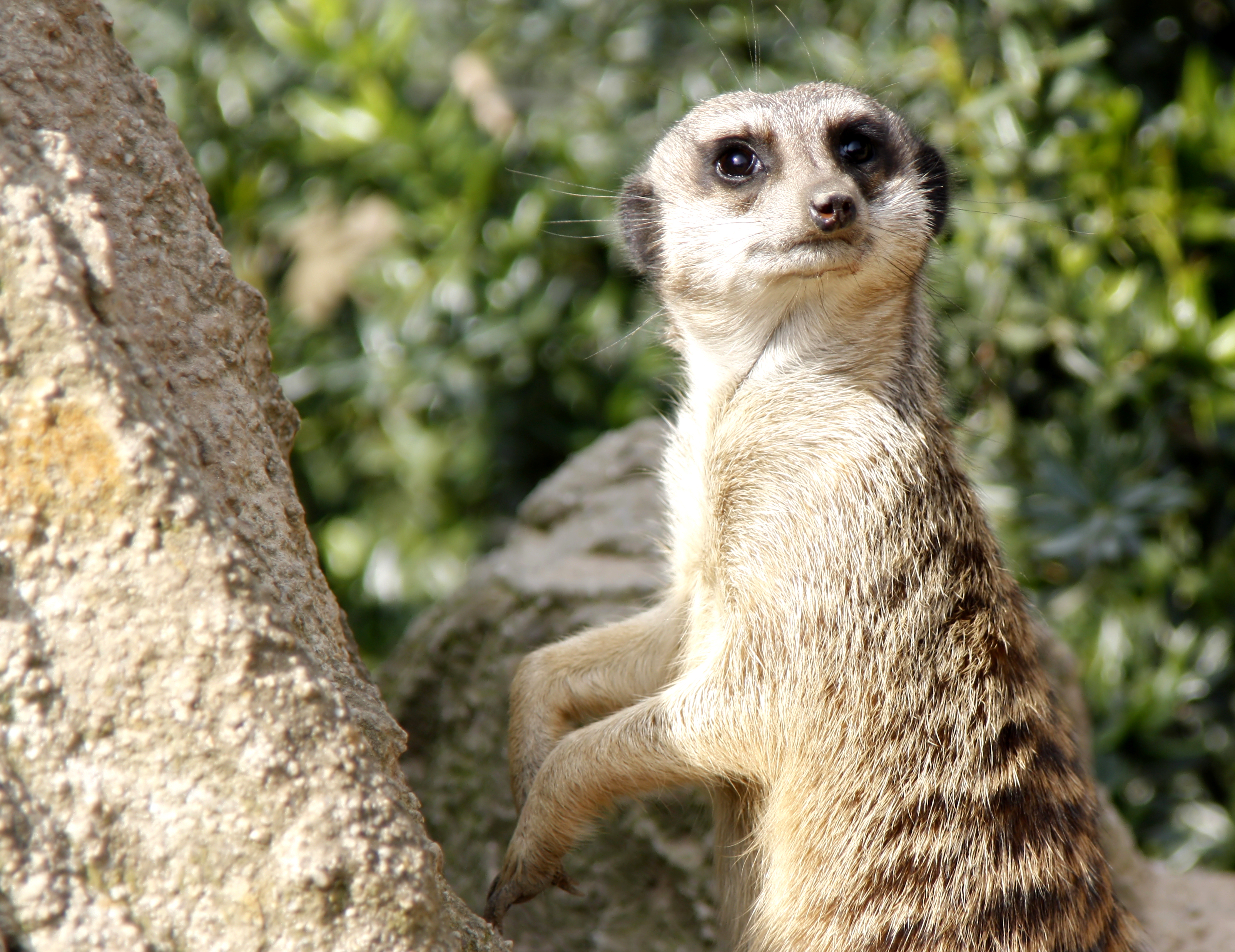 Erdmännchen (Suricata suricatta)